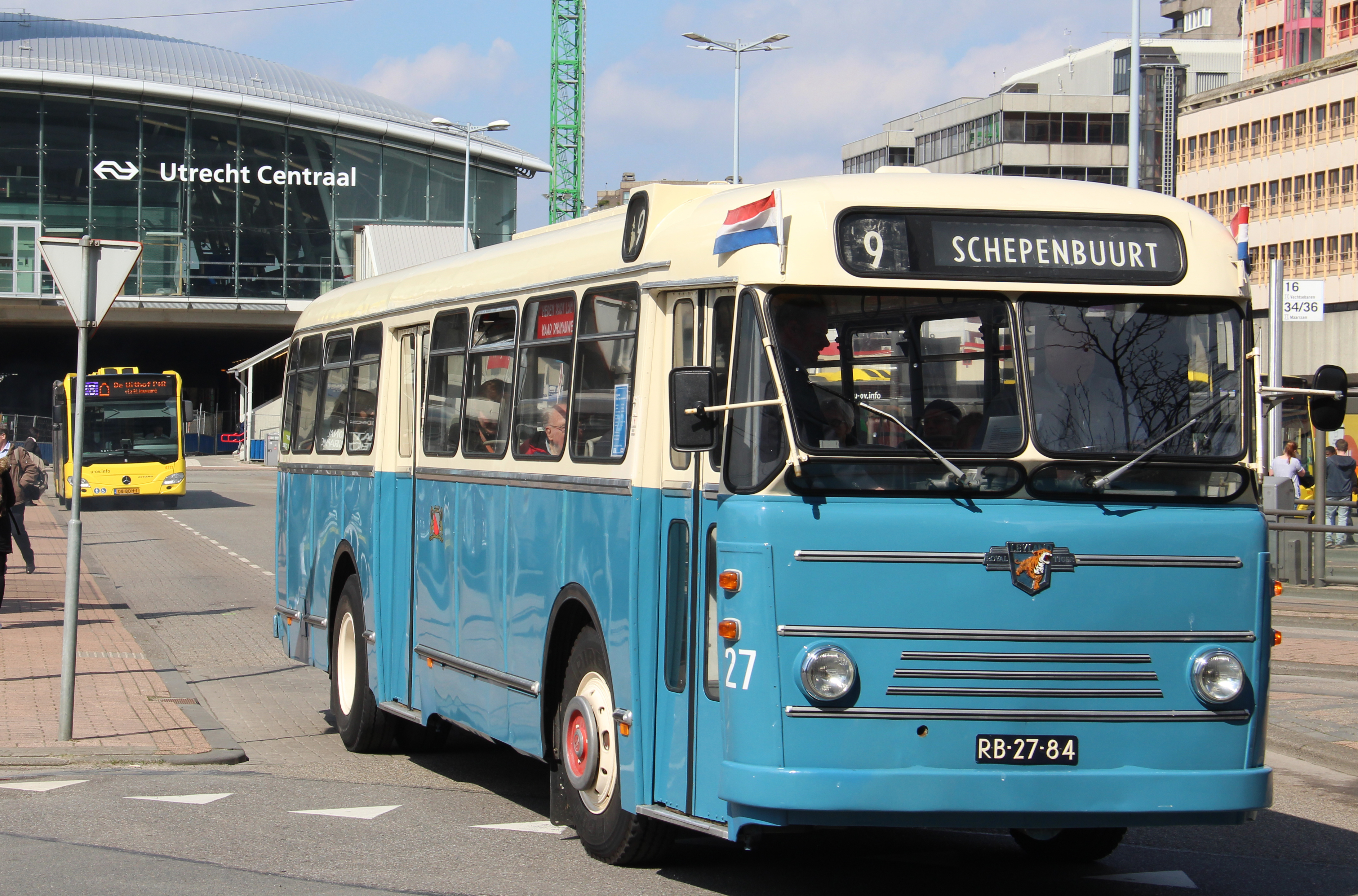 De Leyland-Verheul Worldmaster uit 1956 rijdt begin april 2016 rondritten door Utrecht vanwege het 60-jarig bestaan van dit voertuig.